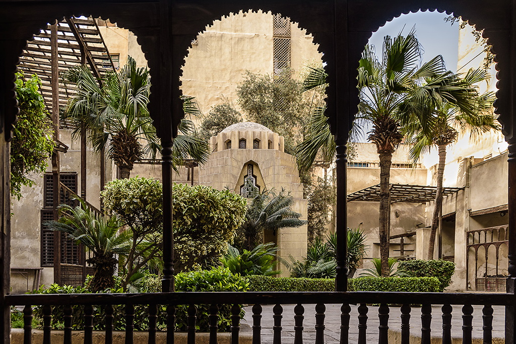 من ساحة بيت السحيمي - الحديقة الخلفية